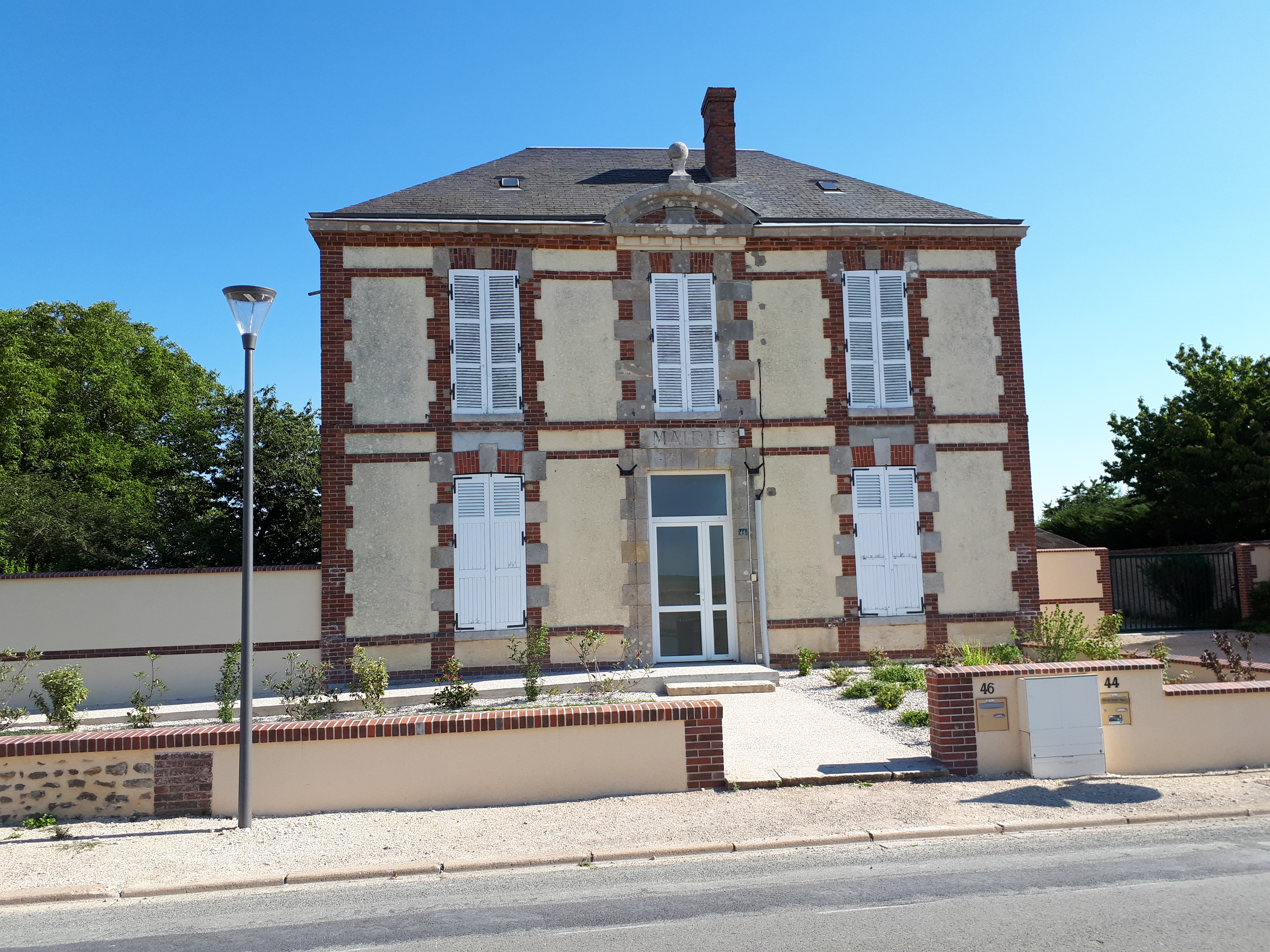 Mairie de Réclainville.